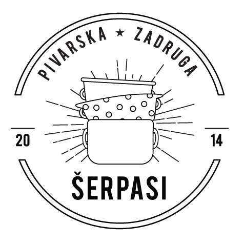 logo Pivarske zadruge Šerpasi